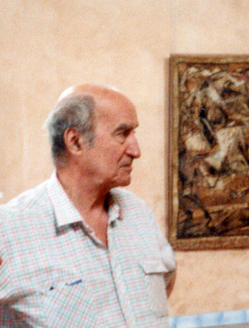 Le romancier et poète français Camille Bourniquel, exposition du peintre Bertholle, La Ciotat (France), 1997